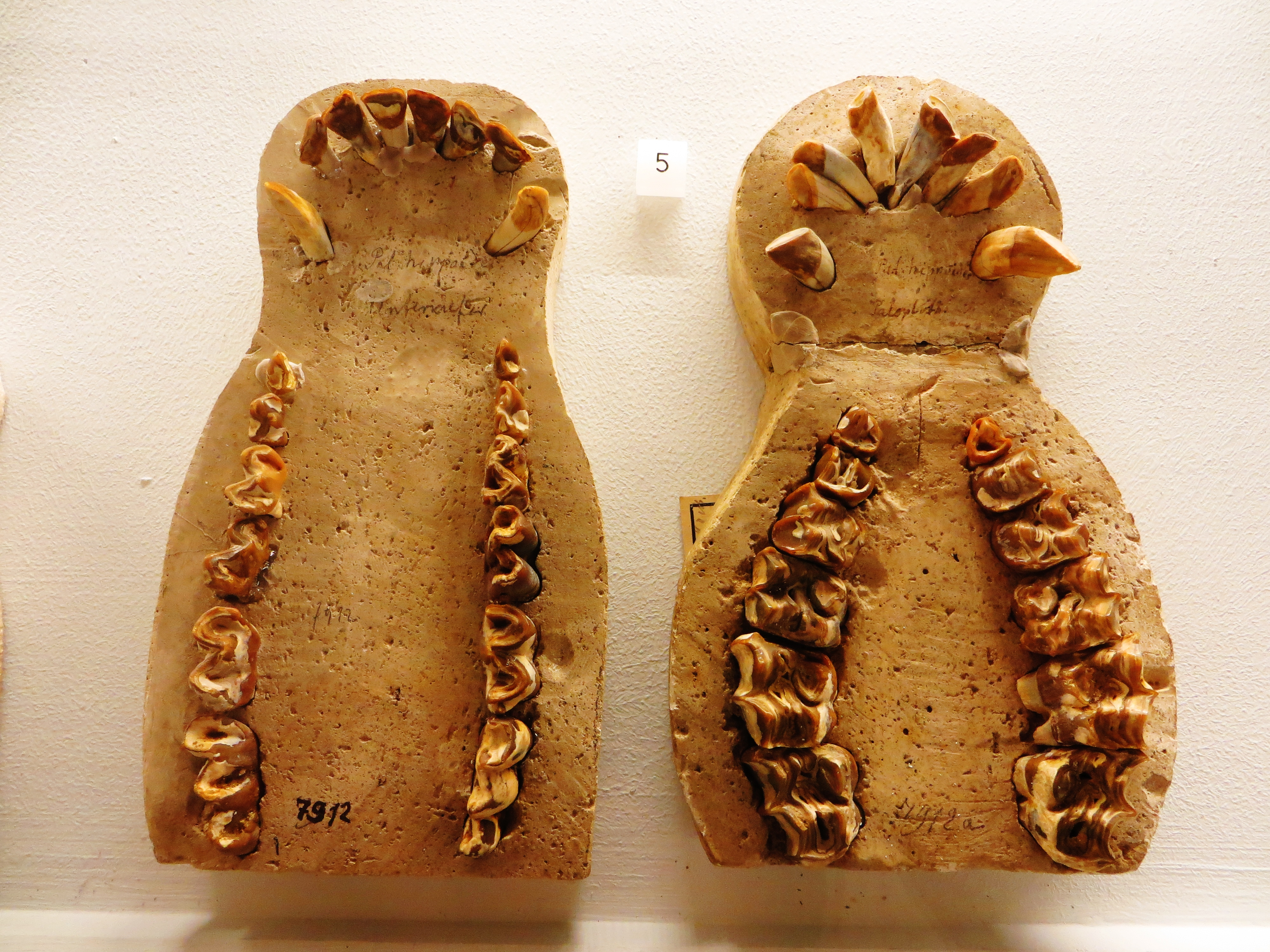 Fossil of Paloplotherium, an extinct mammal - Took the picture at Museum of Paleontology, Tuebingen